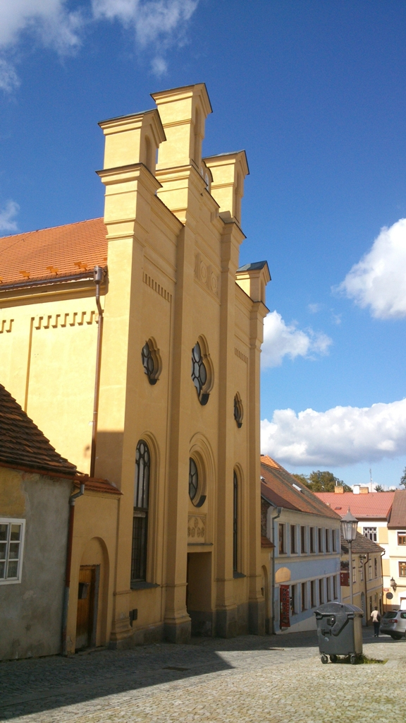 Synagoga (Písek), Soukenická, Písek